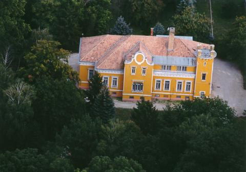 Uraiújfalu, Hungary, aerialphotography